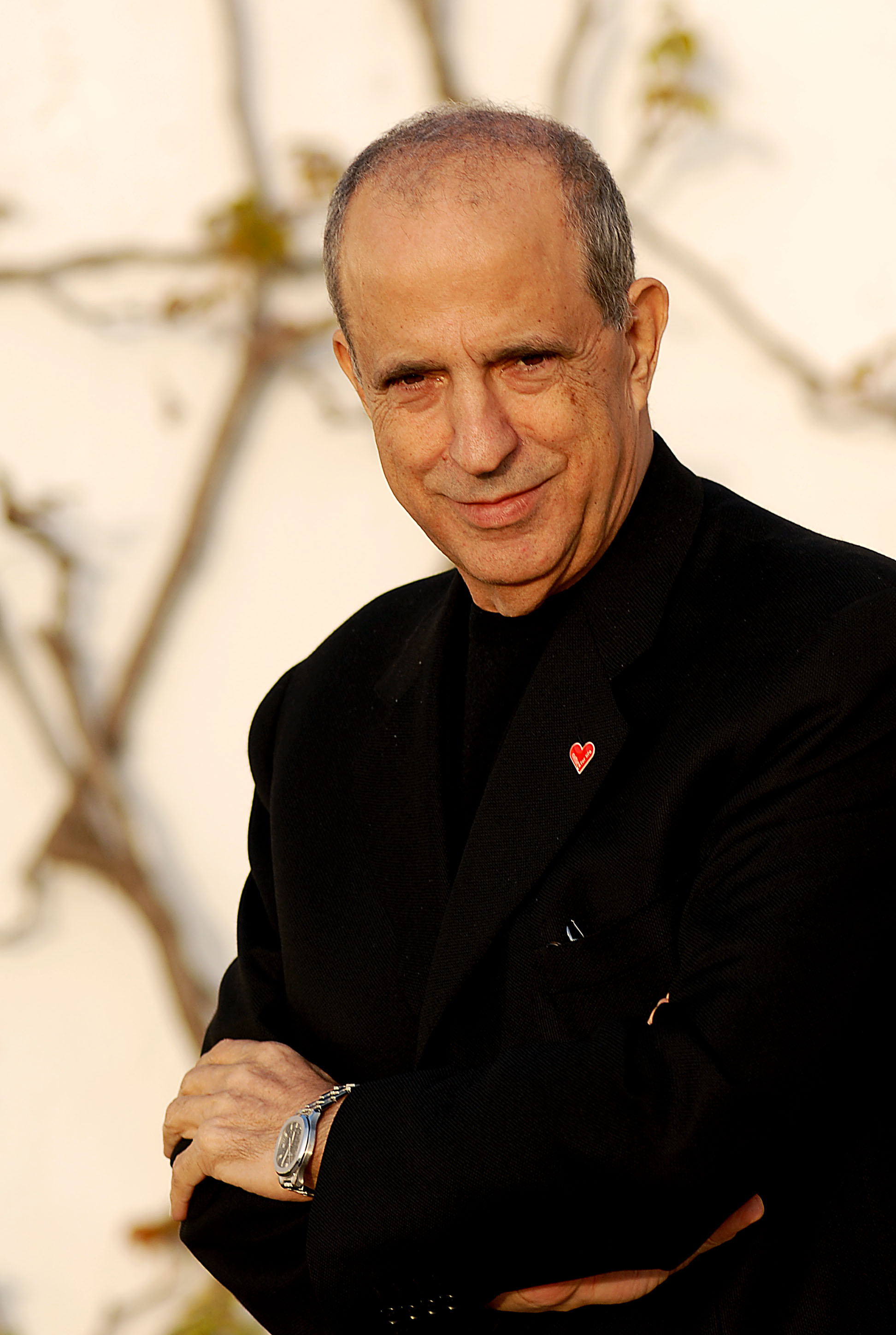 Joe Berardo na Quinta dos Loridos